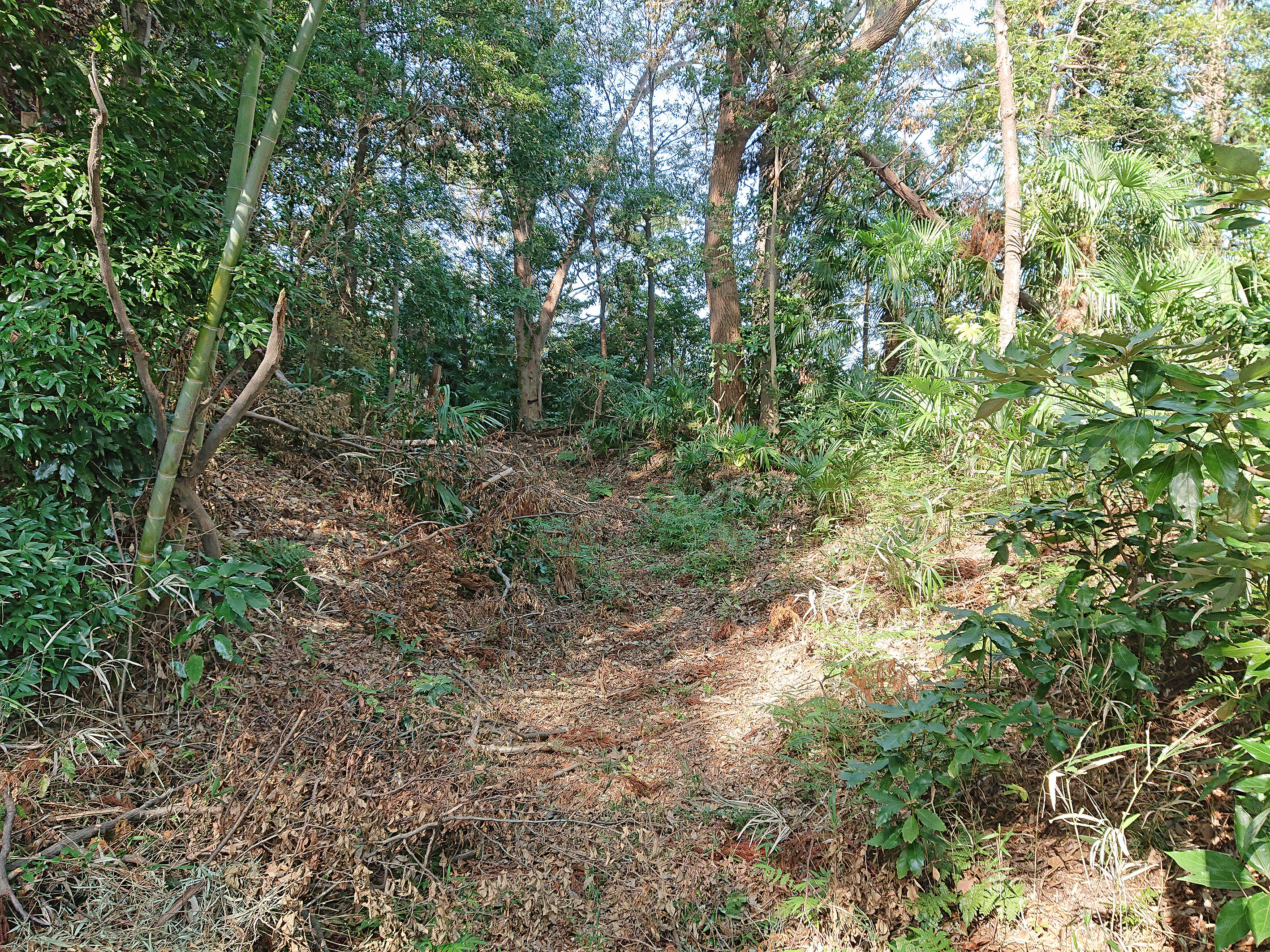 曲輪を囲む篠原城の空堀と土塁